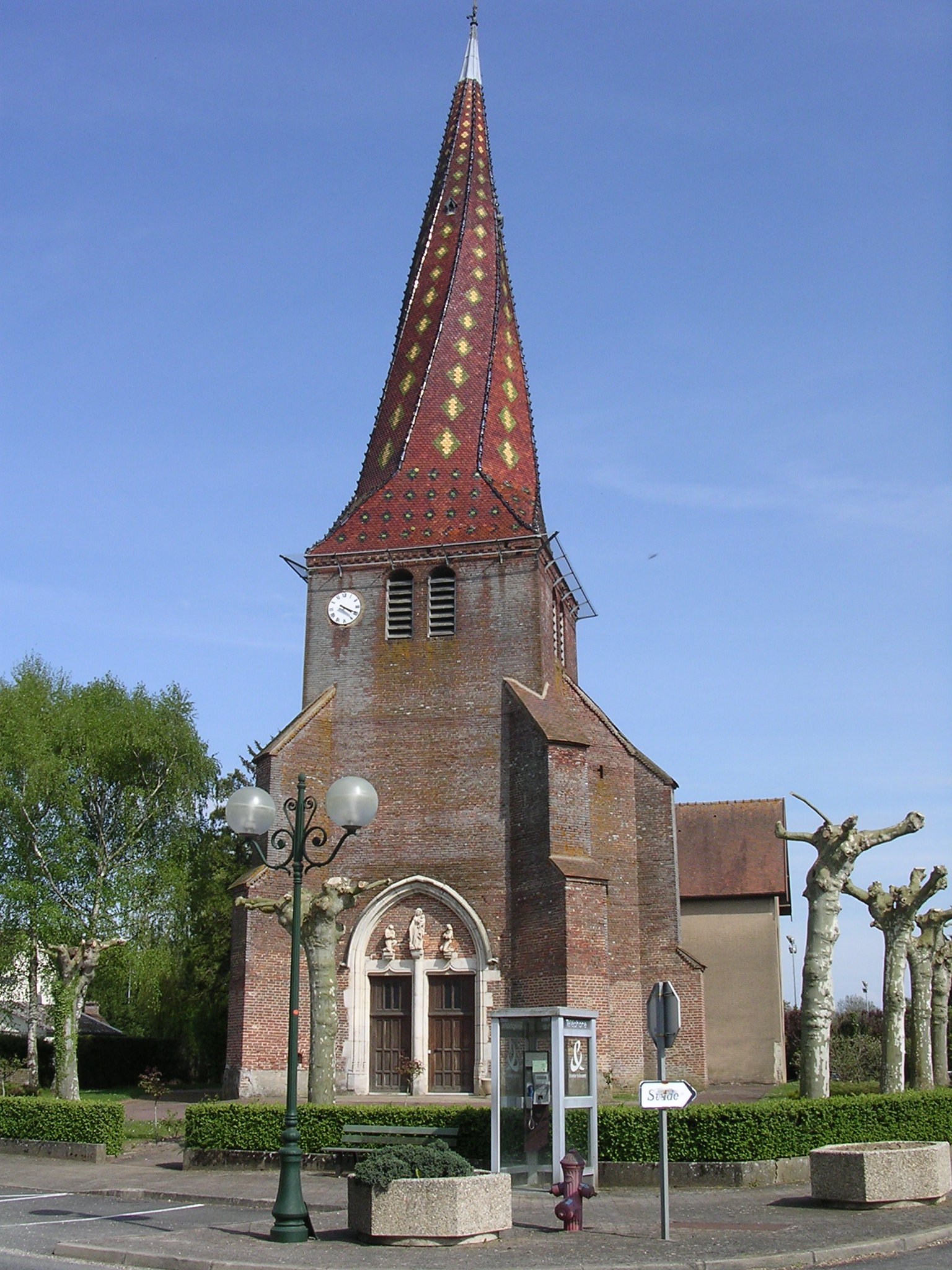 Clocher de l'église de Mervans en Saône-et-Loire